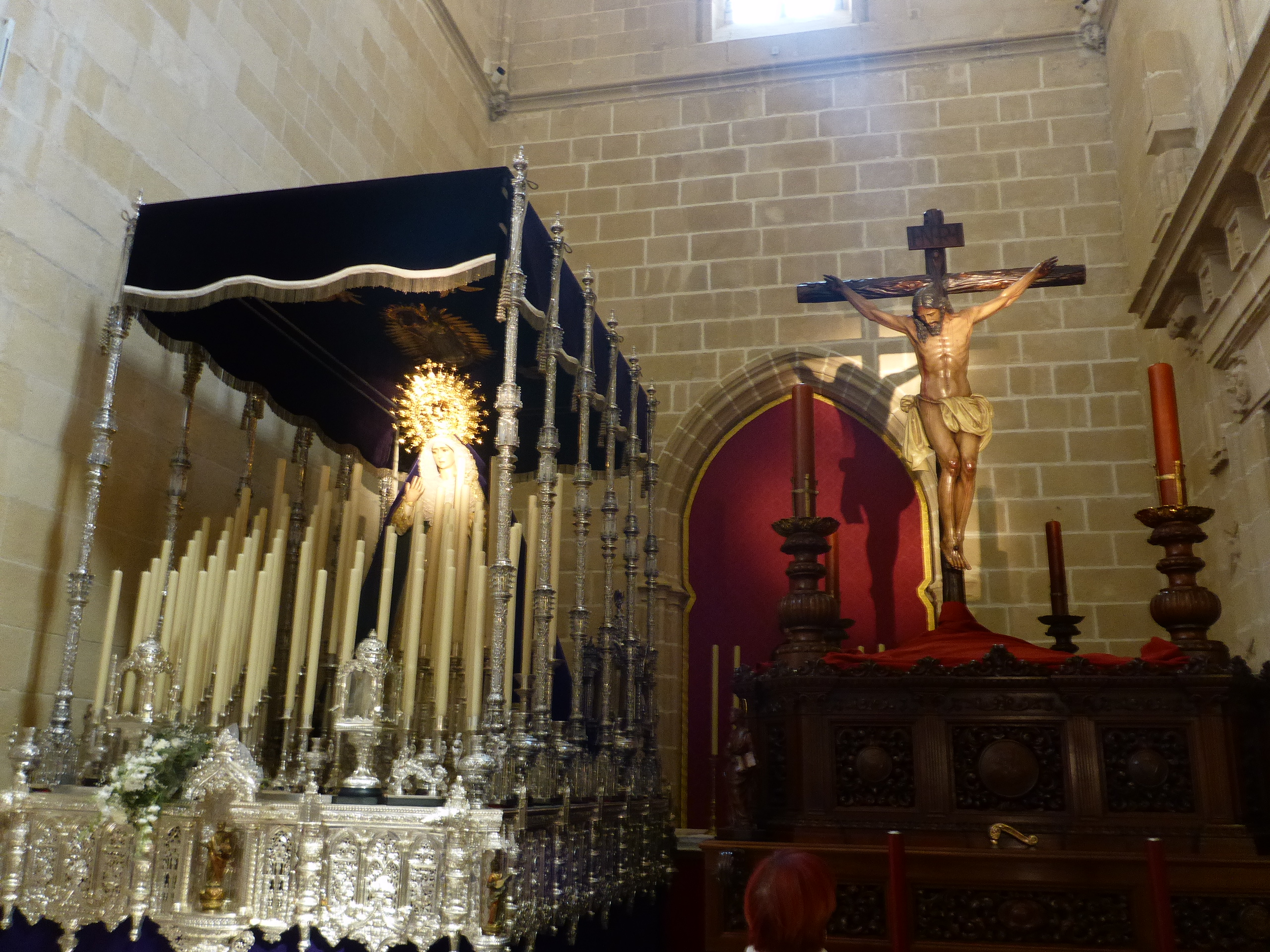 Cuaresma 2017 in Jerez de la Frontera